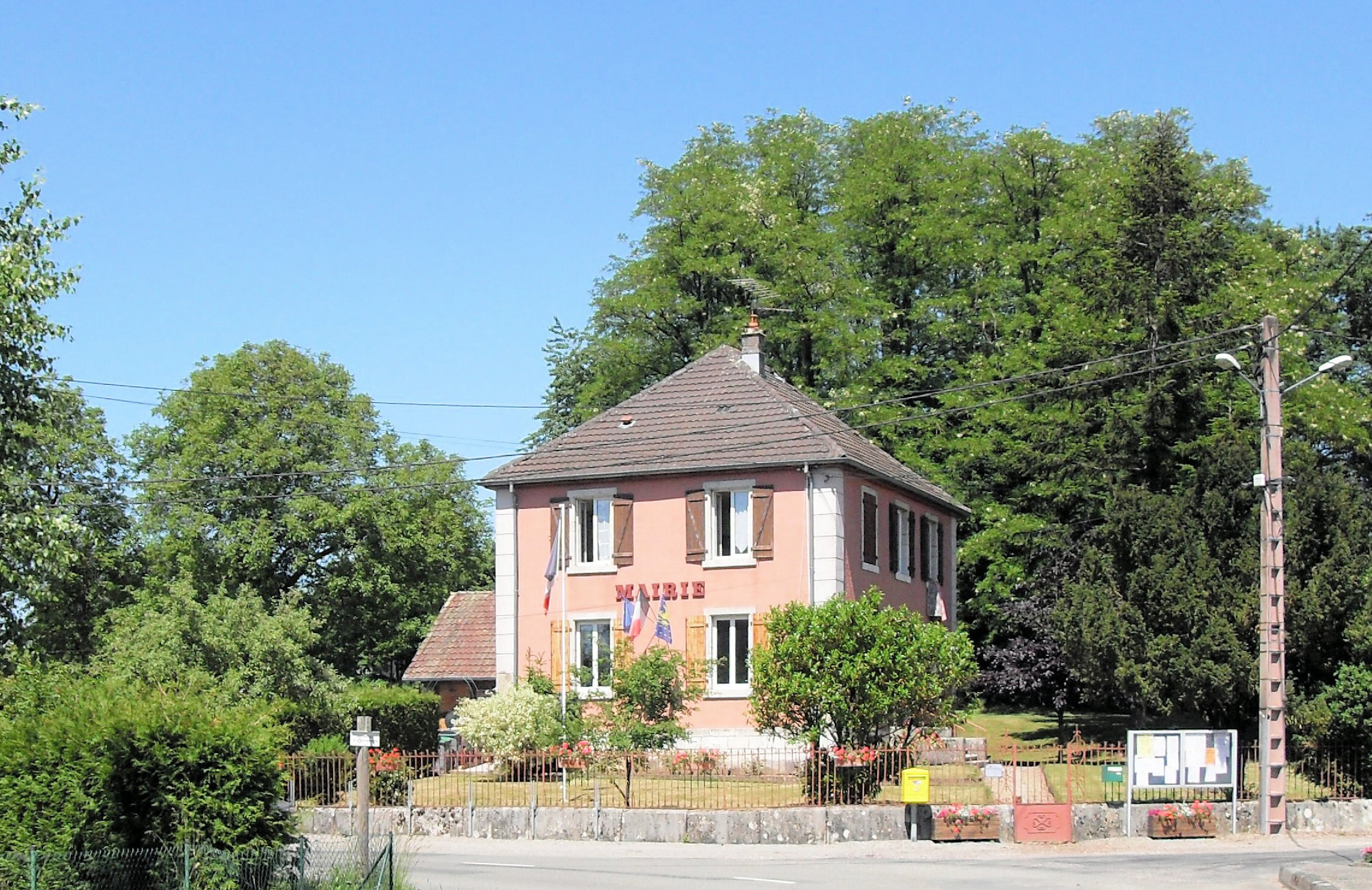 La mairie de Chavannes-les-Grands